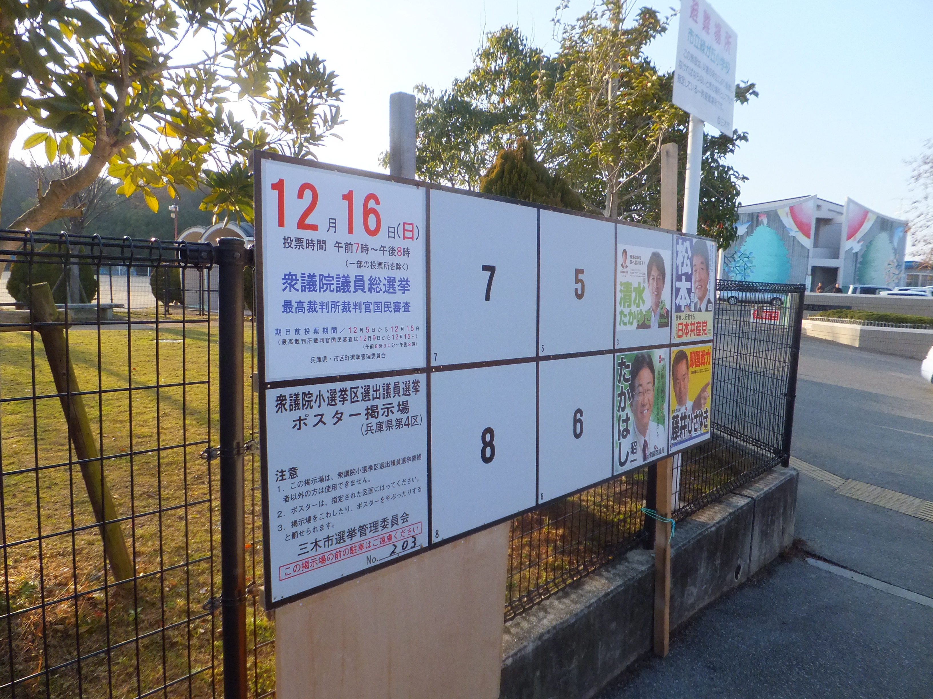 第46回衆議院議員総選挙の兵庫4区におかれている看板